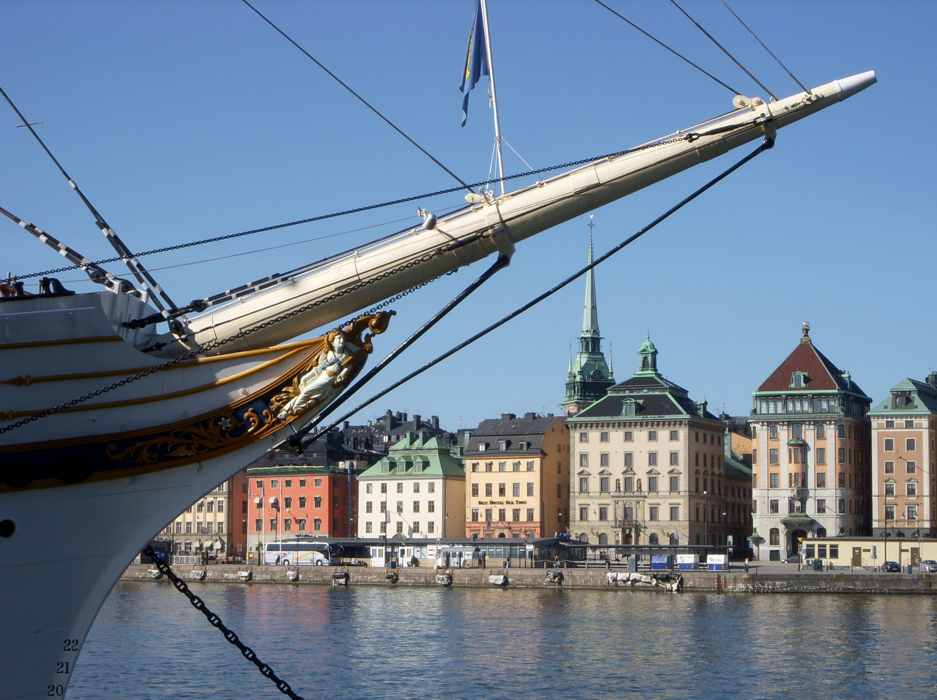 af Chapman i Stockholm, med Skeppsbron och Gamla stan i bakgrunden